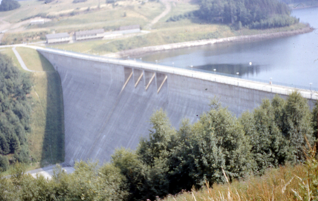 Bad Gottleuba zu DDR-Zeiten